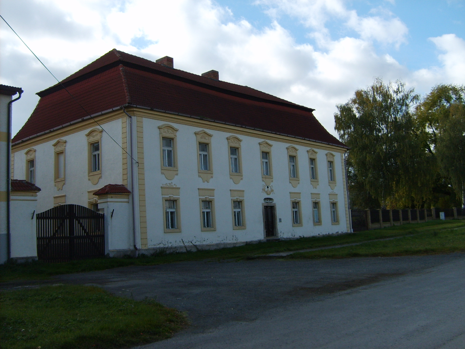 Castle in Vraždovy Lhotice